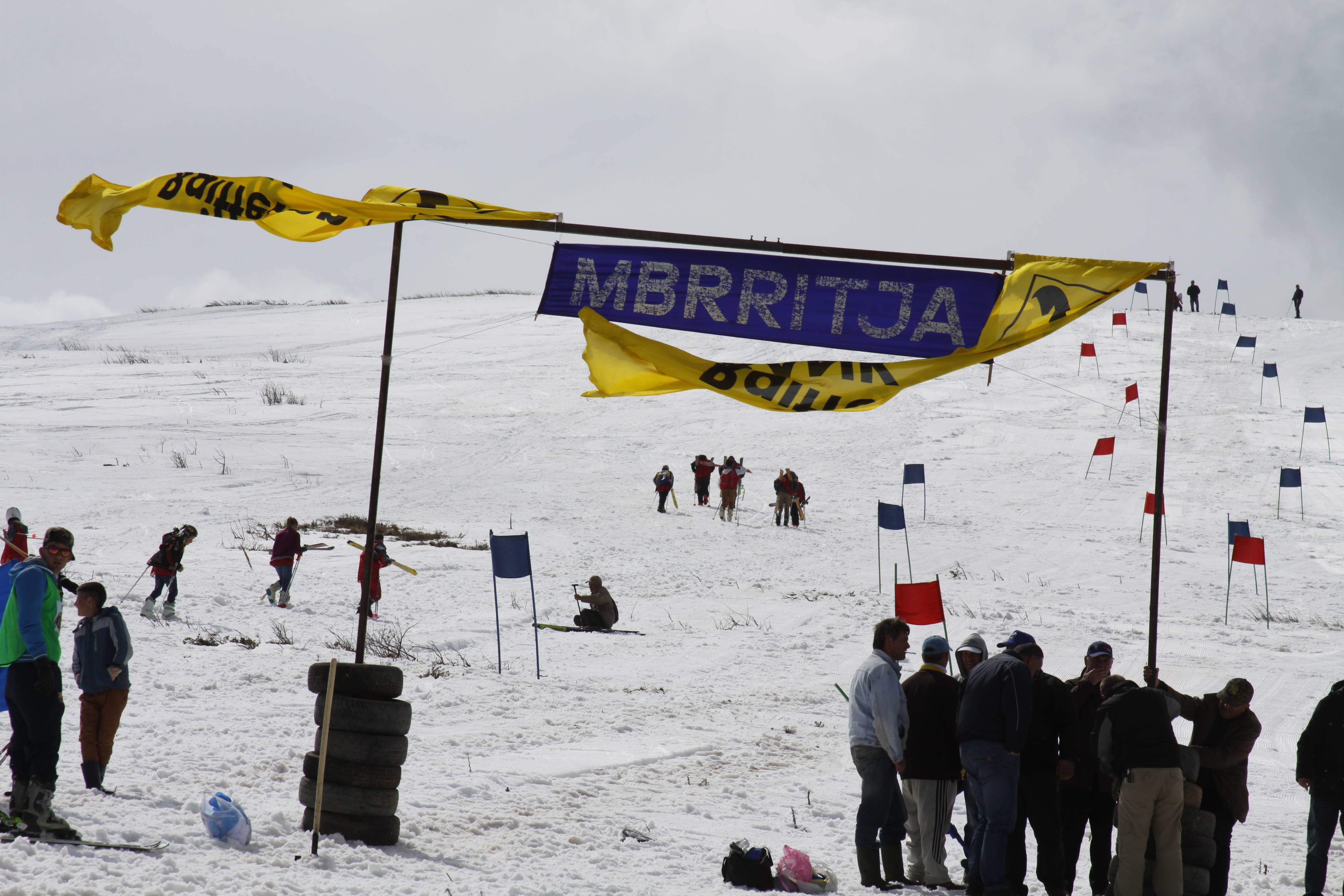 Gara e skive në Shishtavec